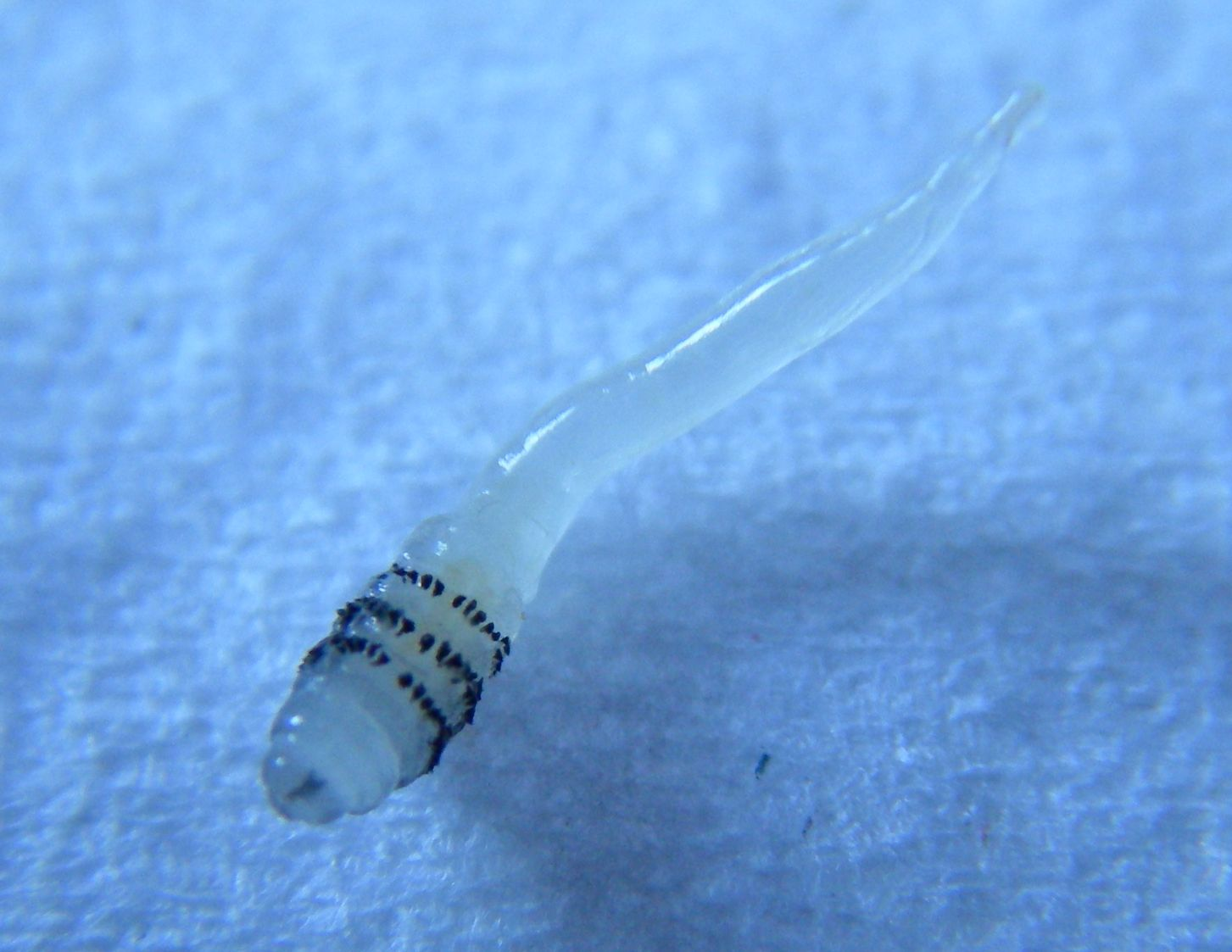 Ver Macaque après extraction (Dermatobia hominis)